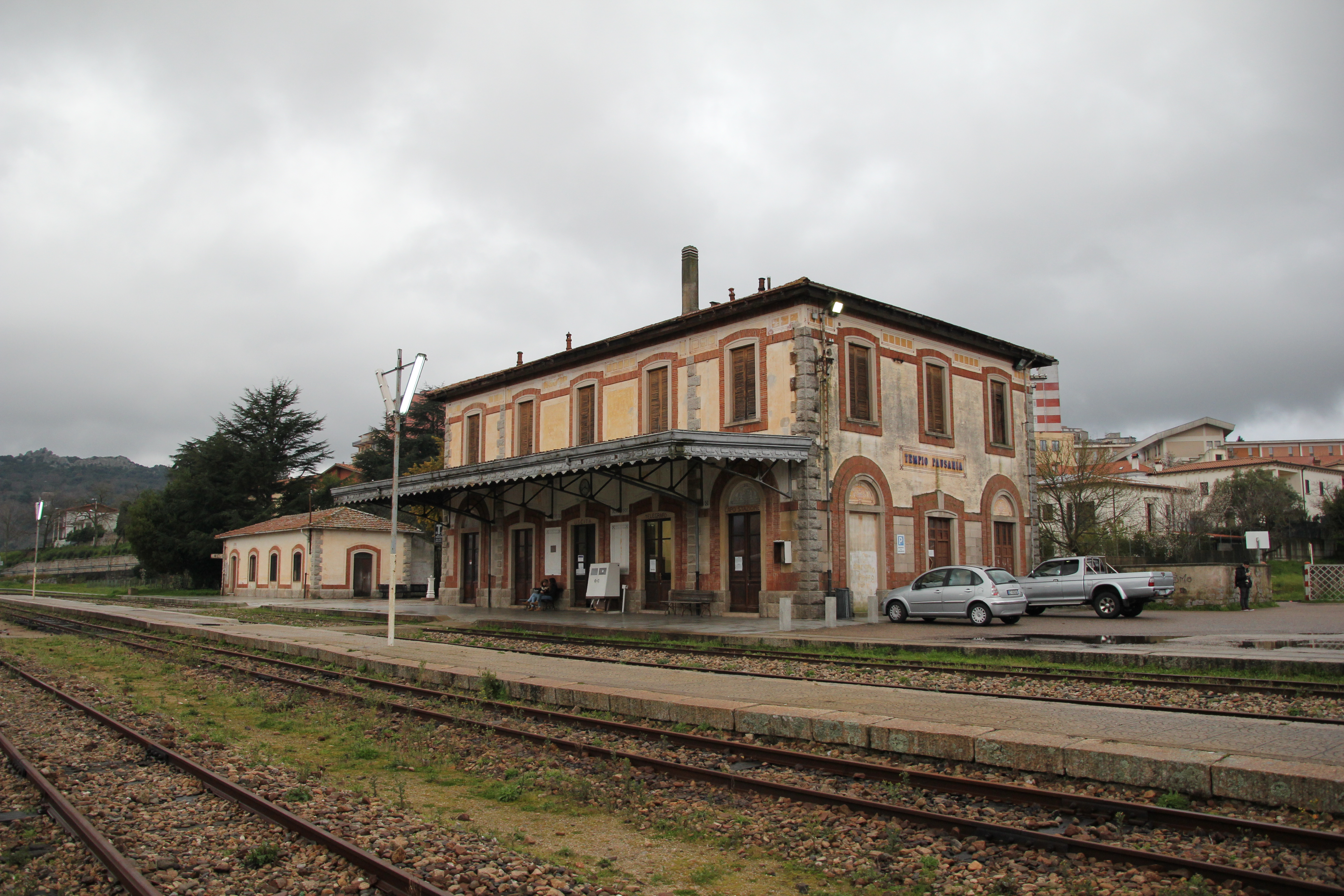 Tempio Pausania - Stazione ferroviaria